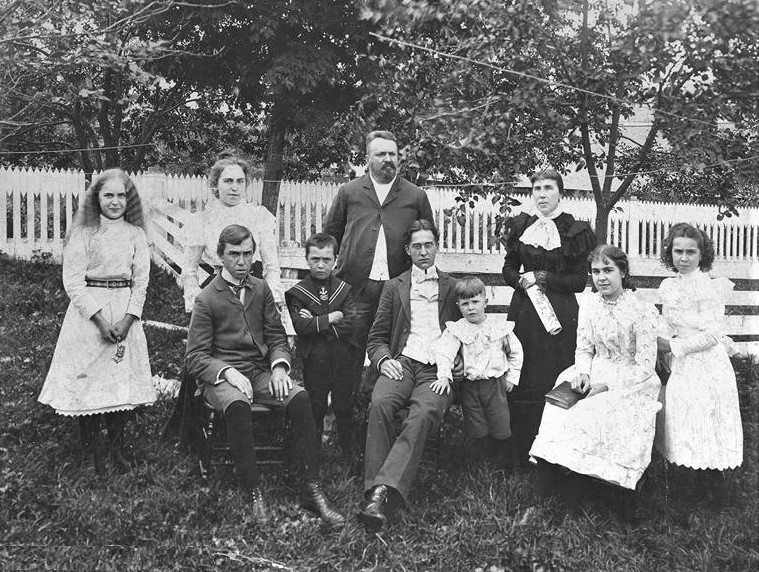 Wilfrid Grignon et sa famille à Sainte-Adèle en 1899 On aperçoit (en commençant par le bas, de gauche à droite) 1re rangée : Raoul (1884-1908), Louis-Marie (1891-1941), René (1882-1928), Claude-Henri (1894-1976), Irène (1886-1935), Jeanne (1889-1931). 2e rangée : Alice (1887-1958), Blanche (1879-1915), Wilfrid (père), Eugénie Baker (mère)